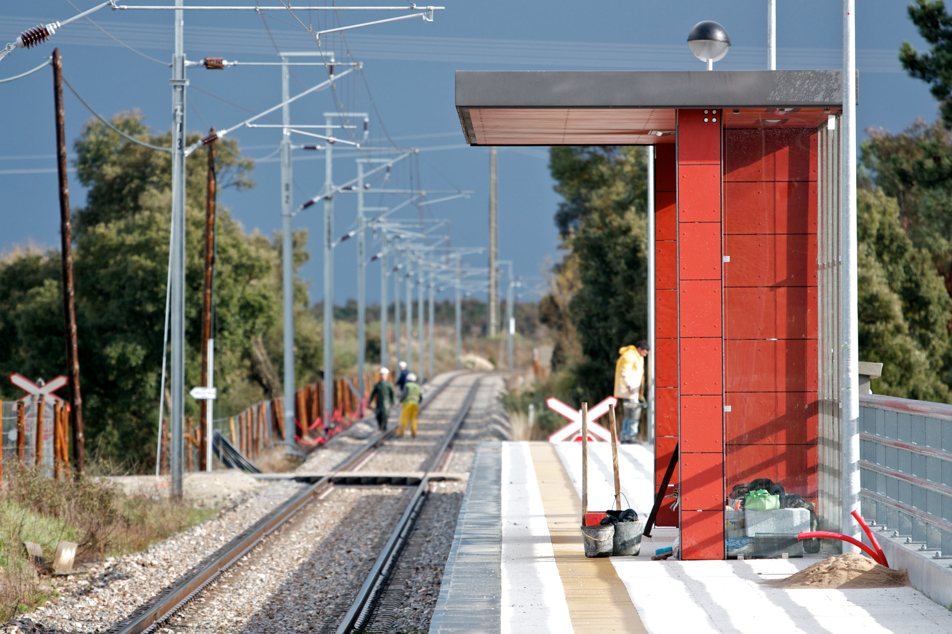 quase dois anos antes. Tipo: A [Apeadeiro] Local: Soalheira [Linha da Beira Baixa , PK 119] Data e hora: 15 de Fevereiro de 2011 [15h38]